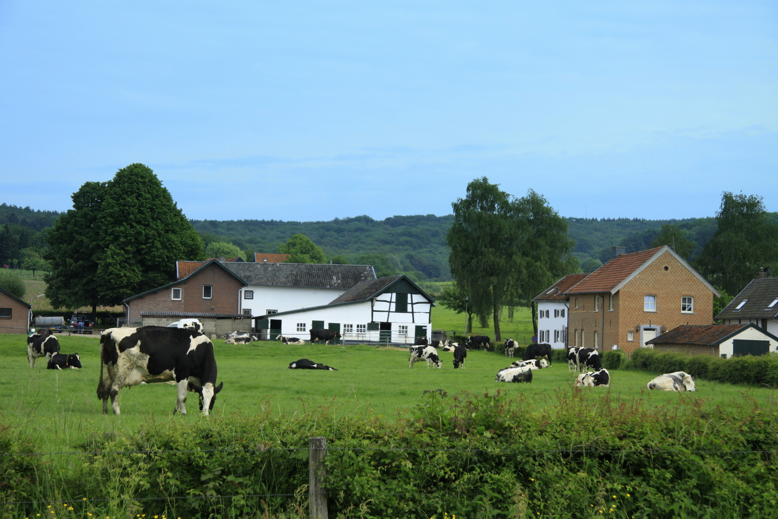 Hurpesh prachtig gelegen in het Geuldal ten zuiden van Mechelen in Limburg.